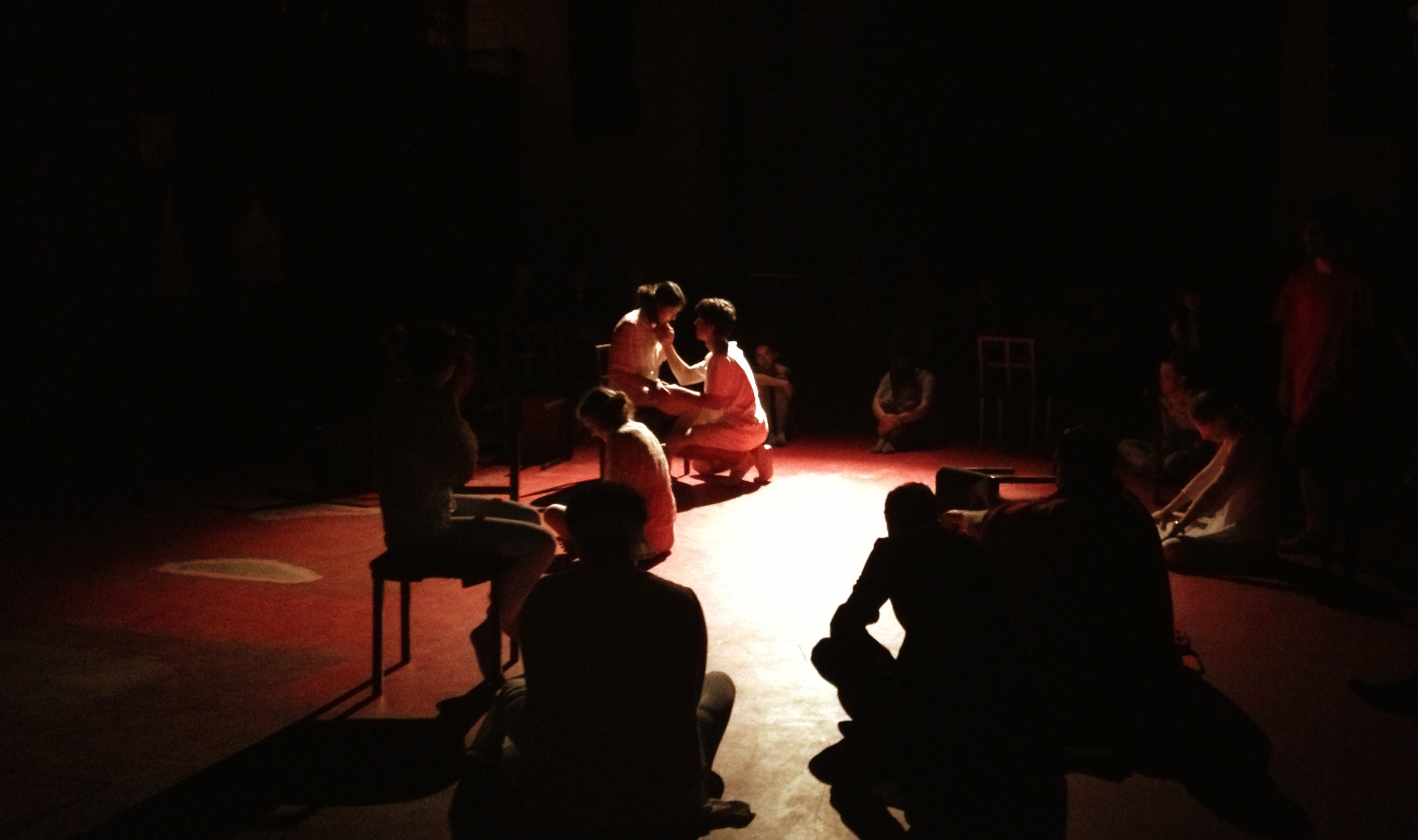 Representación en el Círculo de Arte de Toledo de la obra "La sirena varada" de Alejandro Casona por la compañía Caín Teatro.